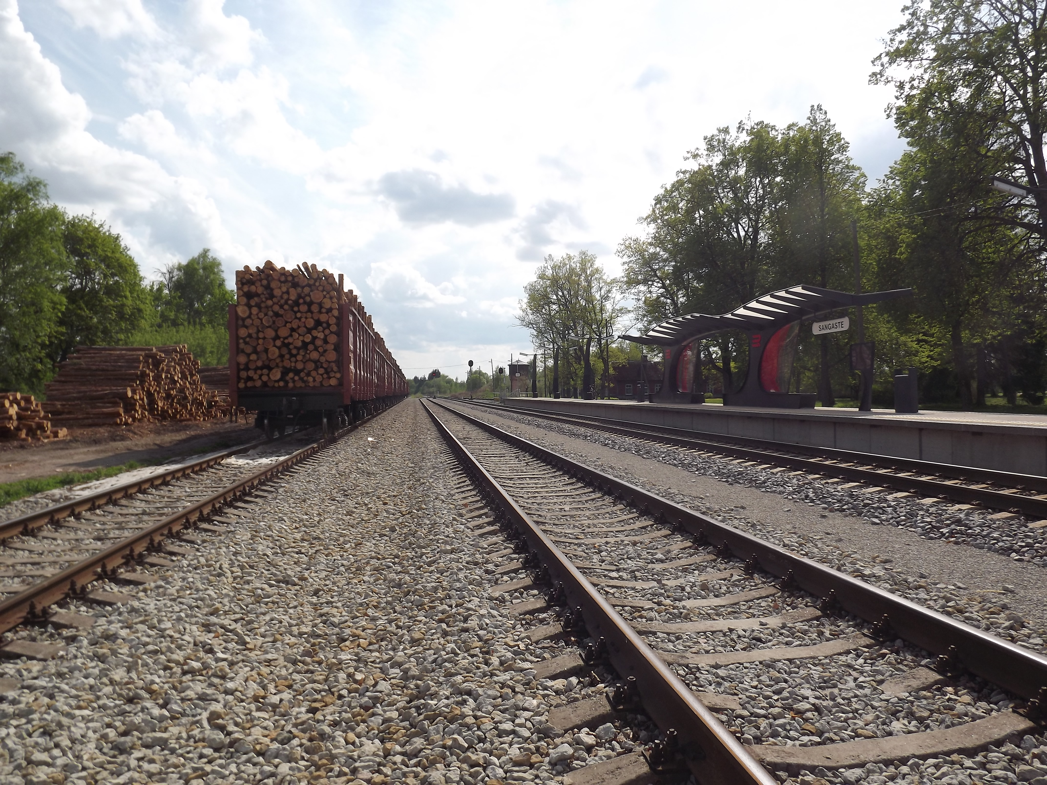 Sangaste raudteejaam